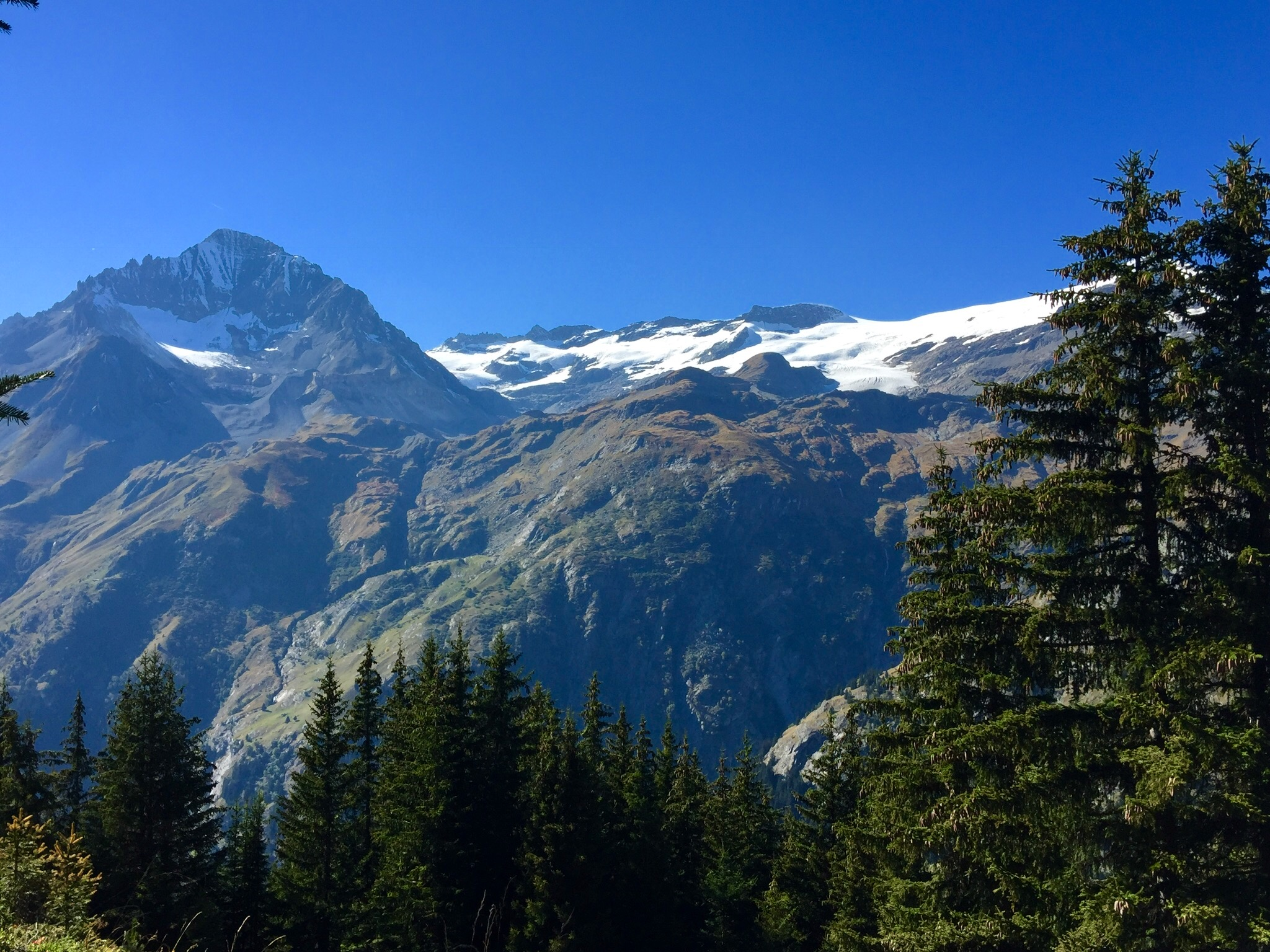 Parc national de la Vanoise, La dent Parrachée et le Dôme de l'Arpont